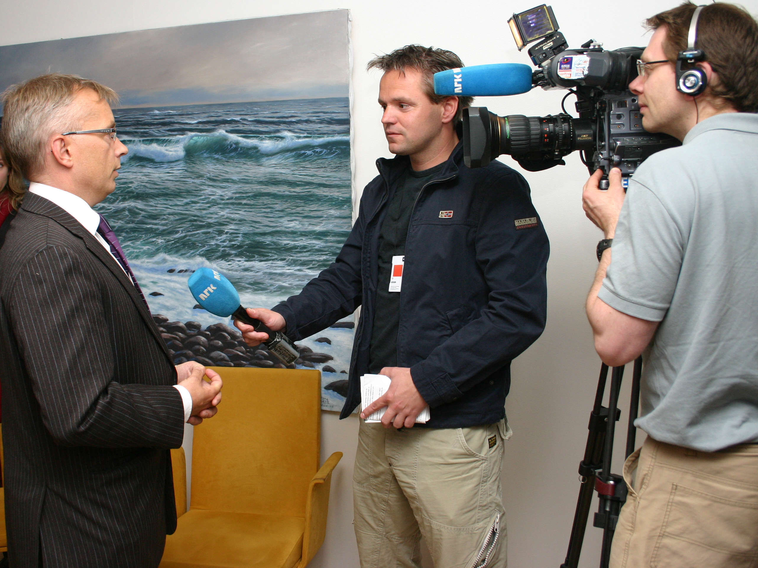 Knut Storberget blir intervjuet av NRK.